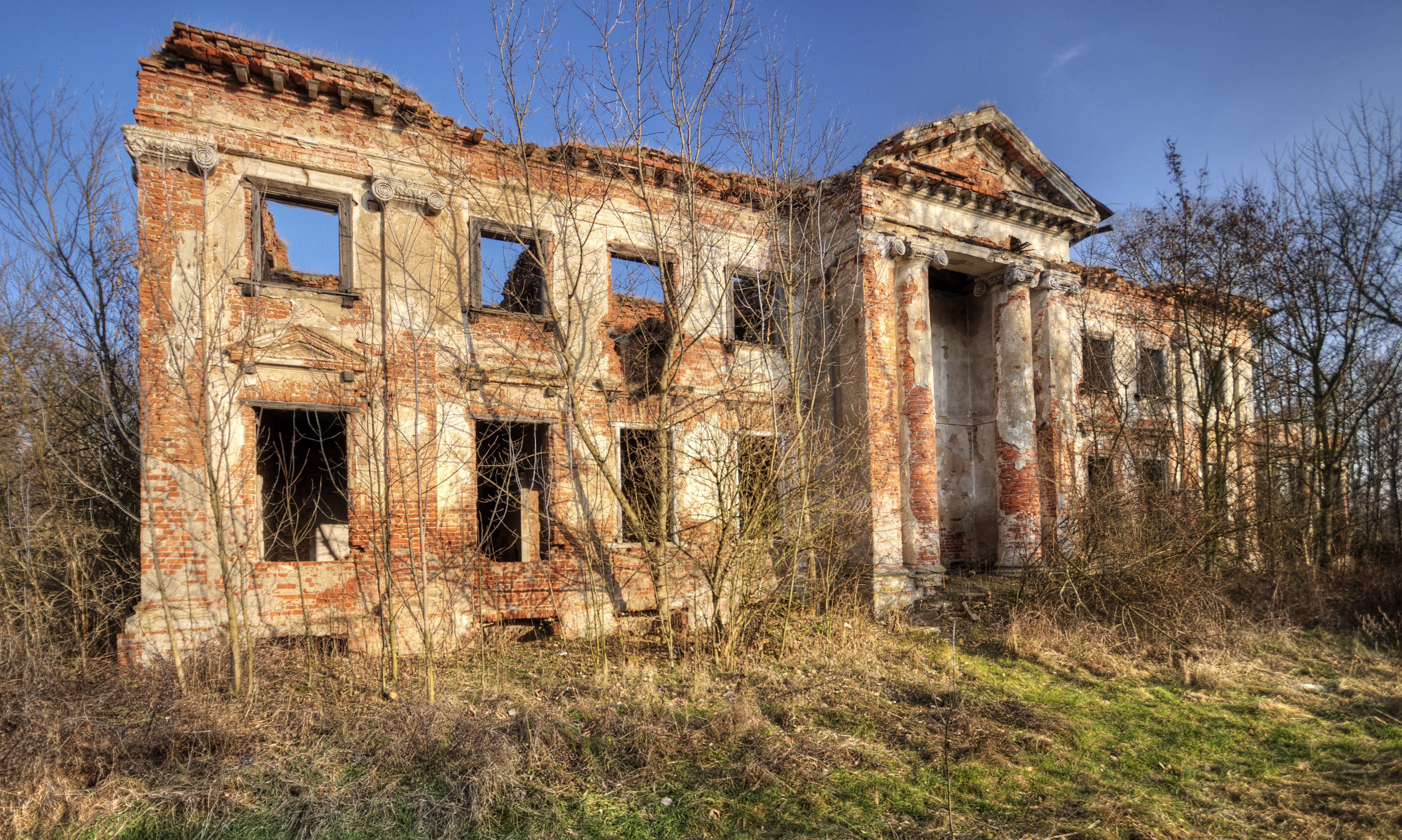 Zruinowany pałac w Studzieńcu (pow. płocki) z przełomu XVII i XVIII wieku